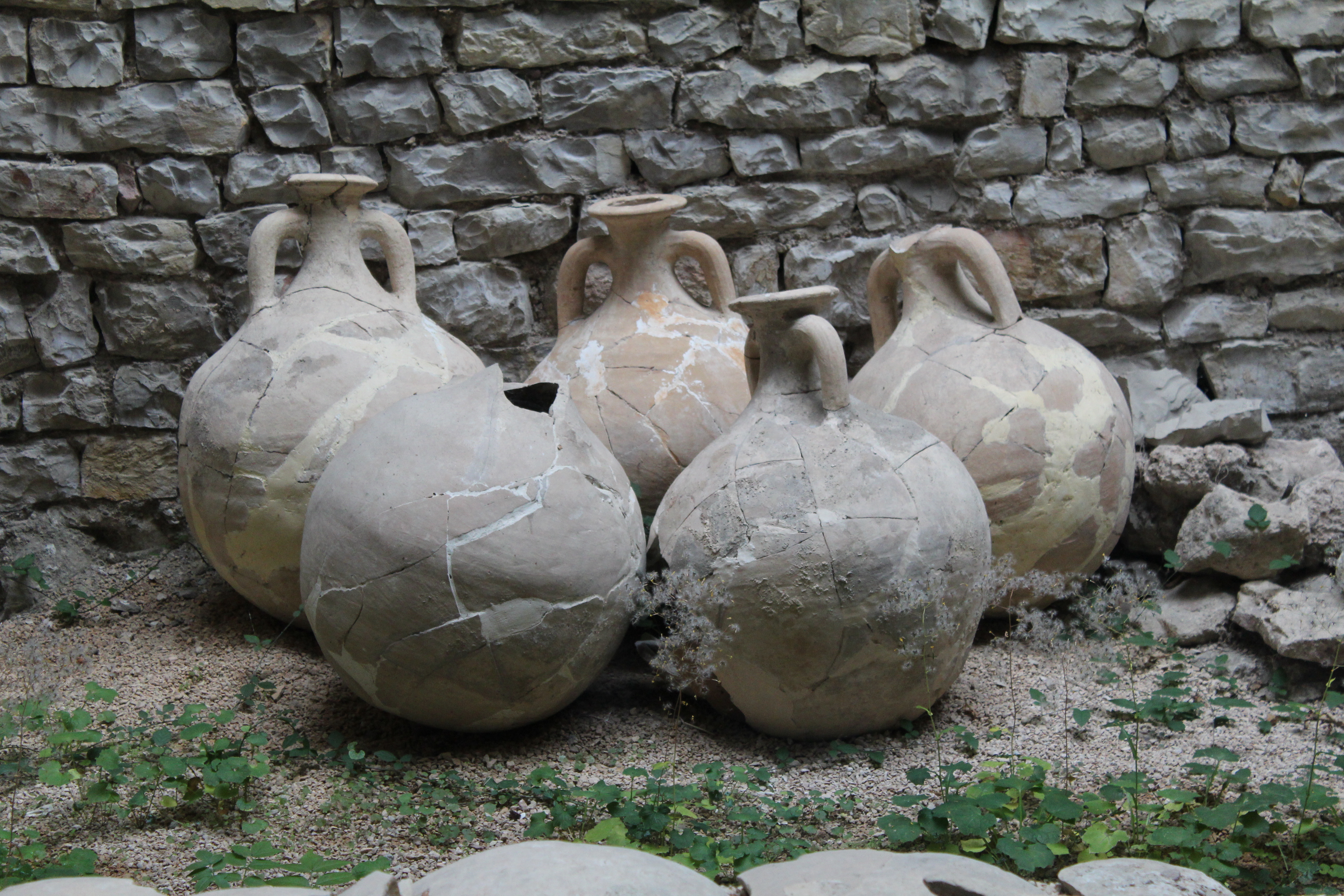 Reconstitution d'amphores le long du passage des Amphores à Mâcon. Le mur contre lequel elles sont adossées est un vestige des anciens remparts romains.